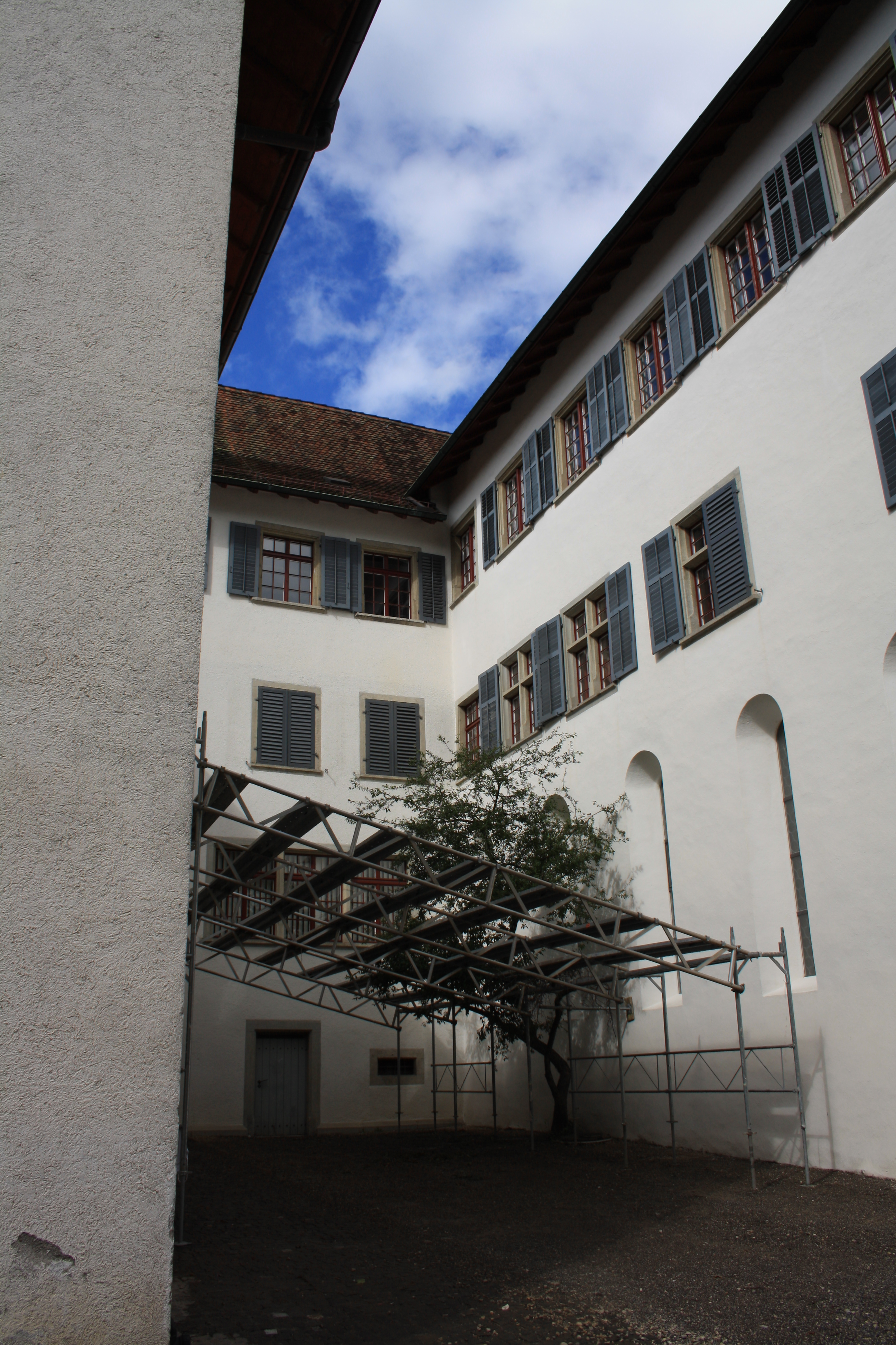 Kloster Wettingen